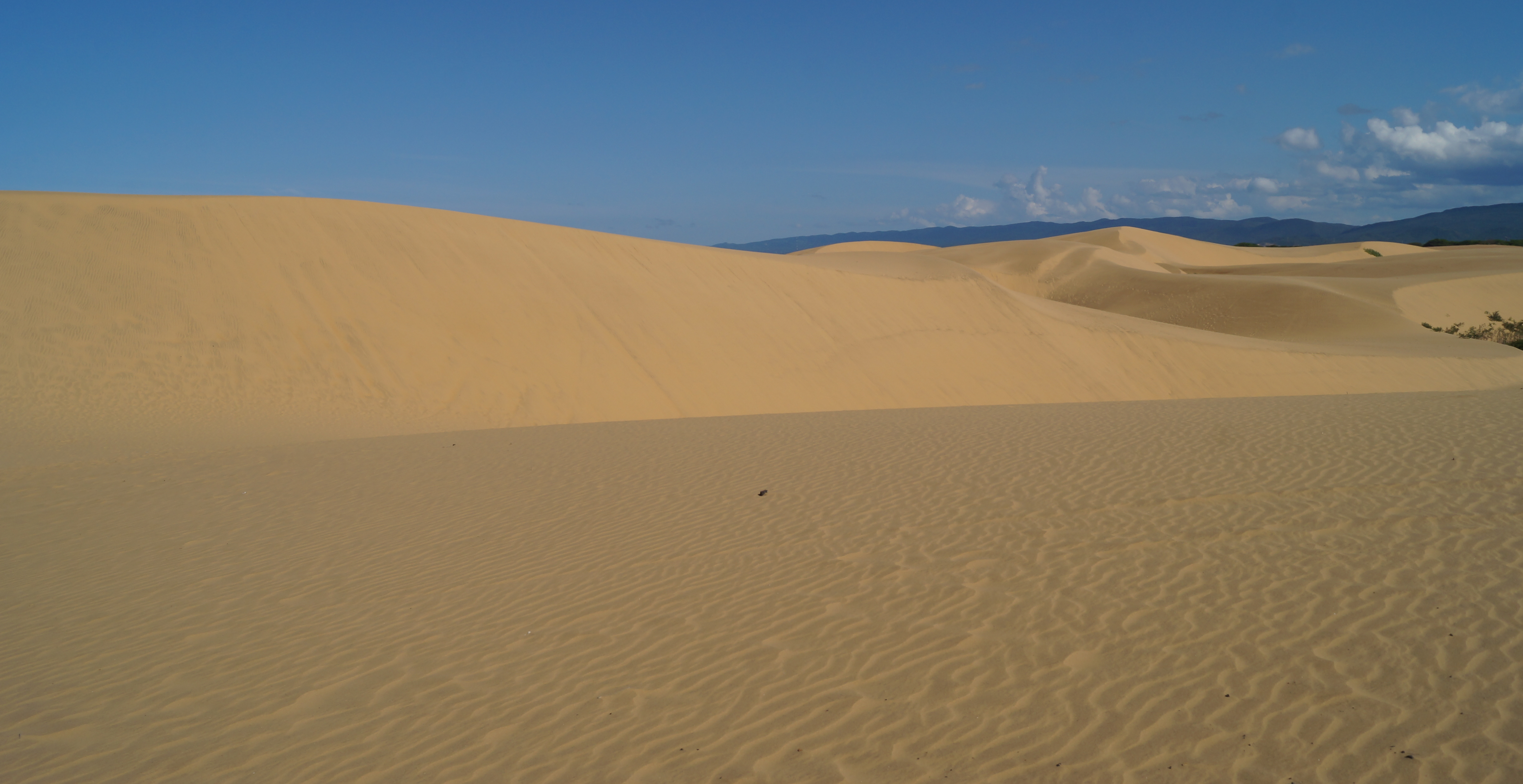 Médanos de Coro, Duna